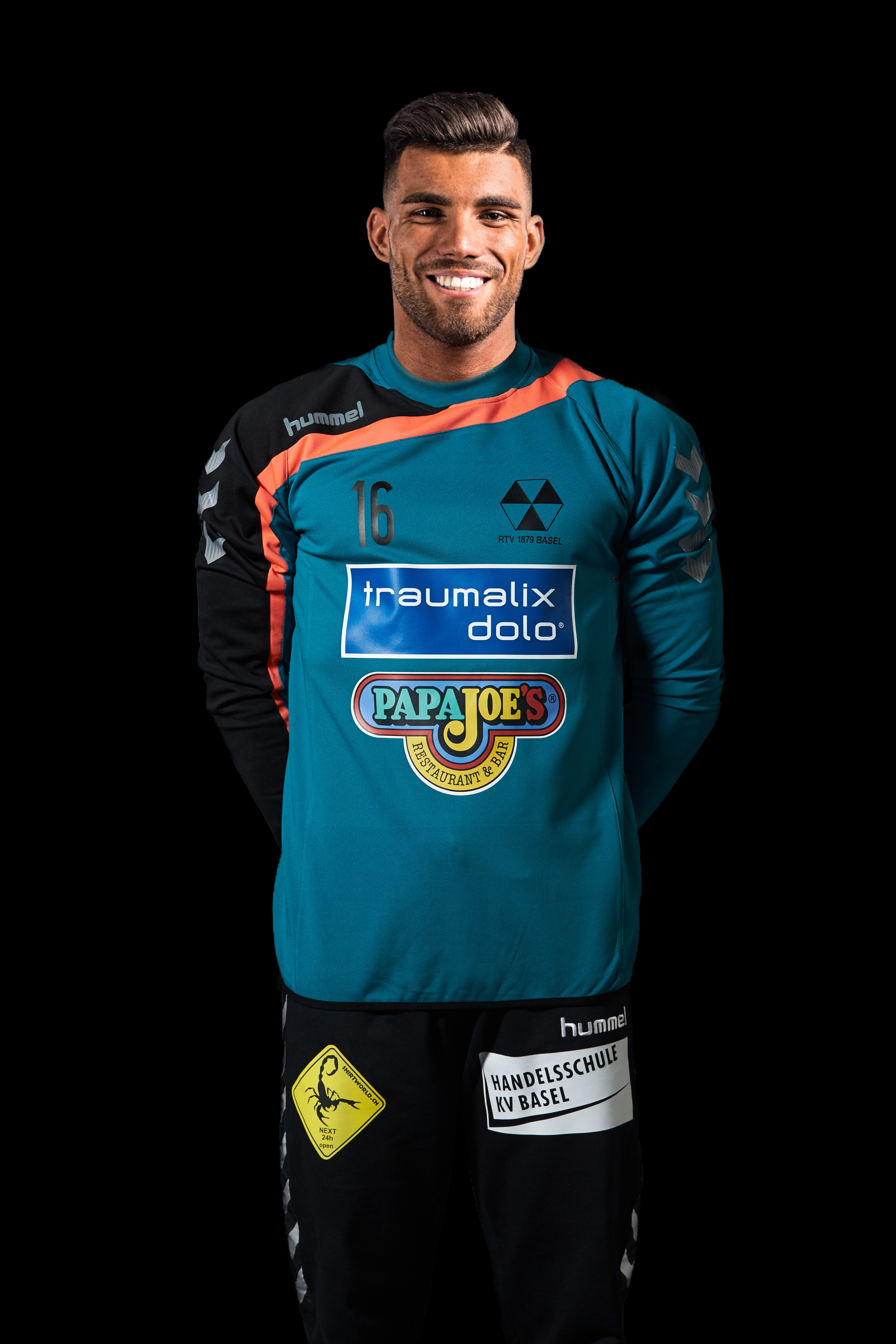 Portrait